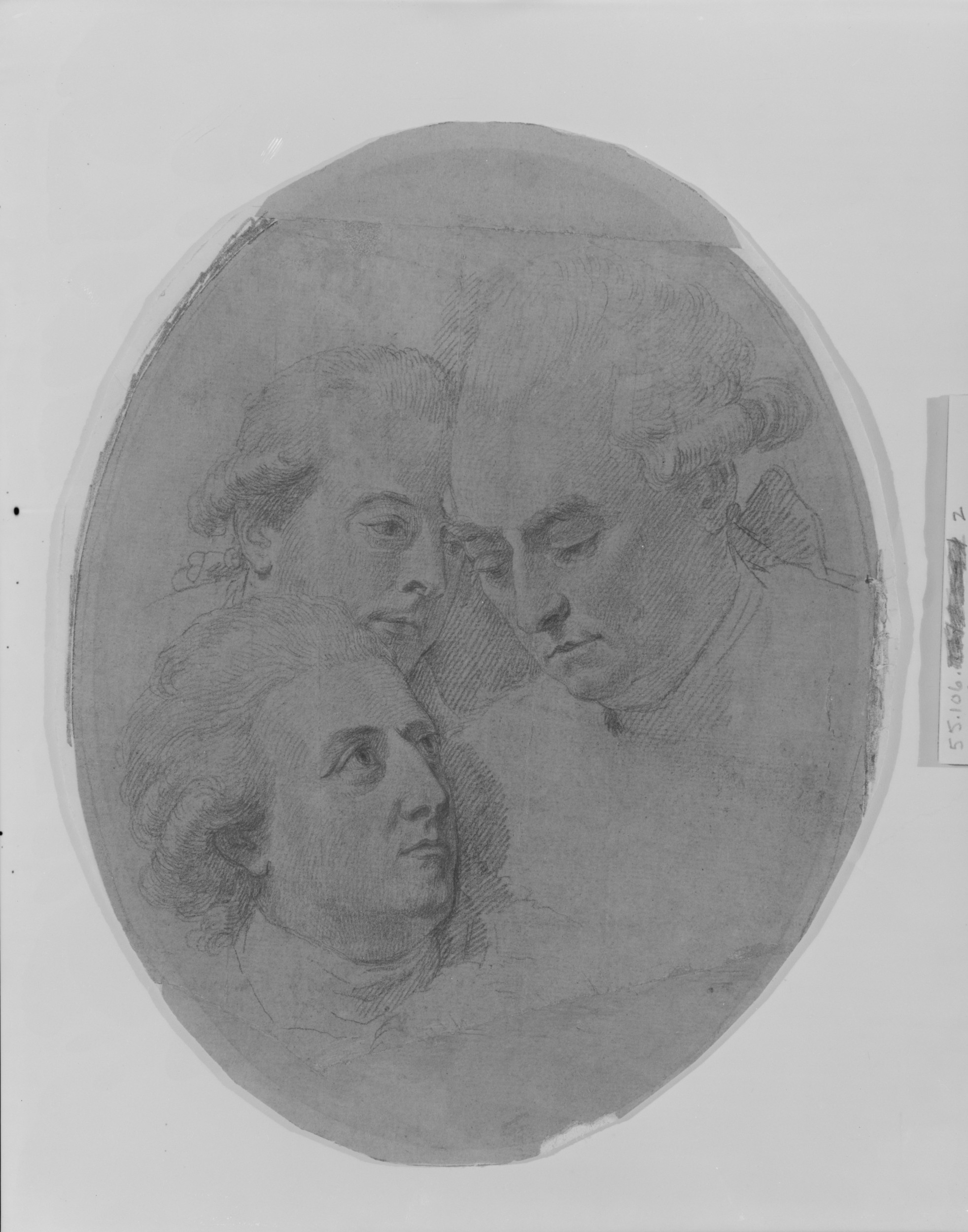 Drawing; Drawings